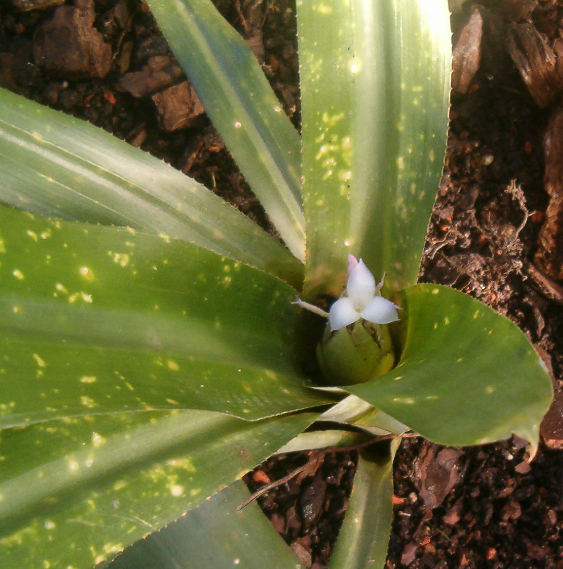 At Botanical Gardens Berlin-Dahlem Species Ronnbergia nidularioides